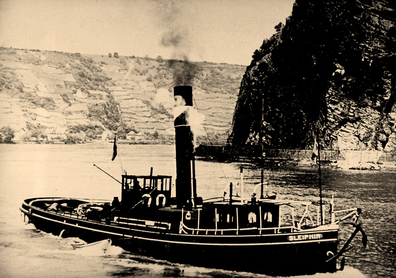 het ss Succes, omgedoopt tot ss Sleipnir in 1916